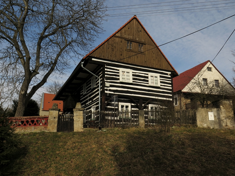 Usedlost čp. 10, Horky 10, Horky (Dubá).